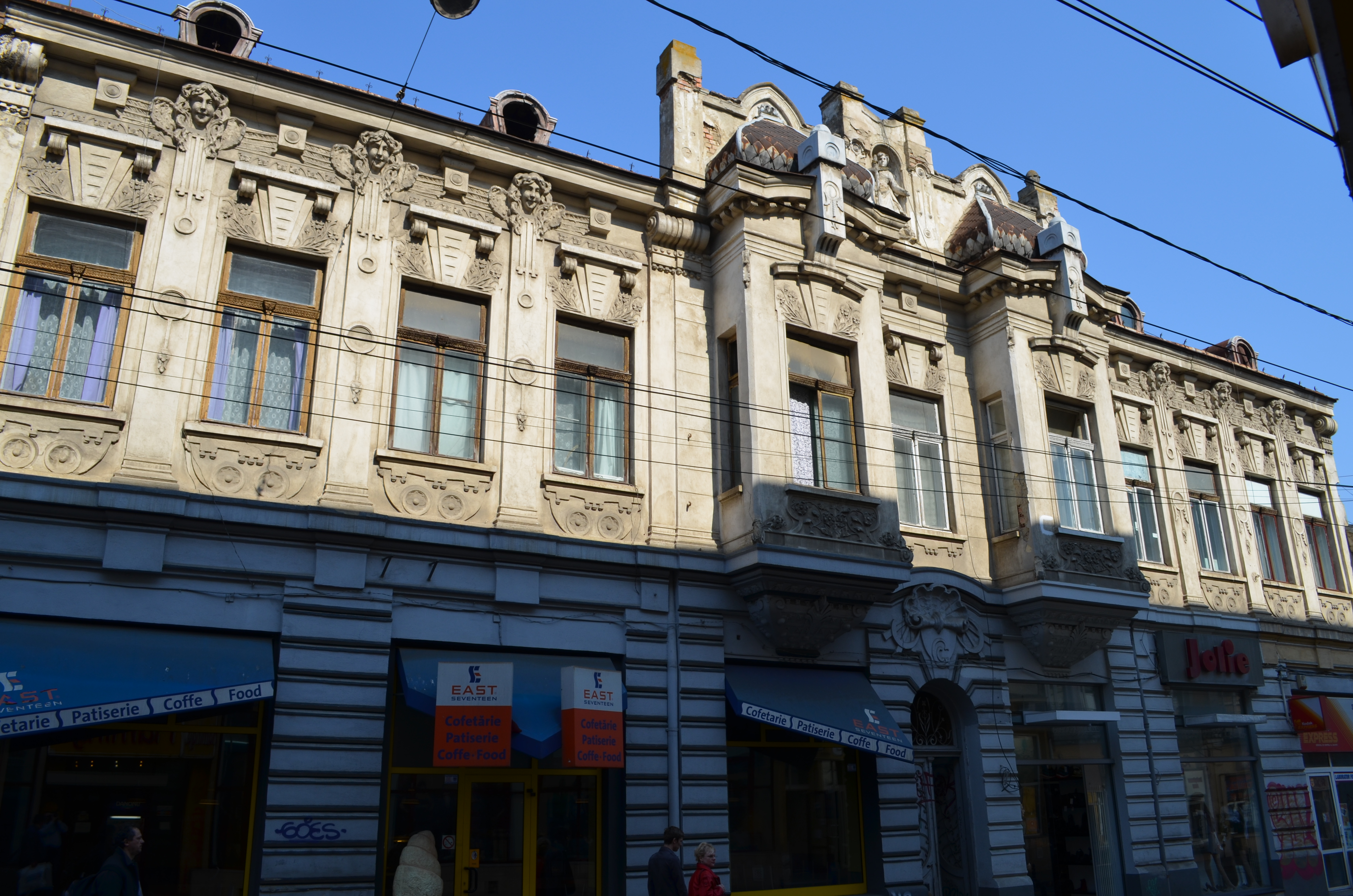 Clădire istorică, Strada Cuza Vodă nr. 11, Iași